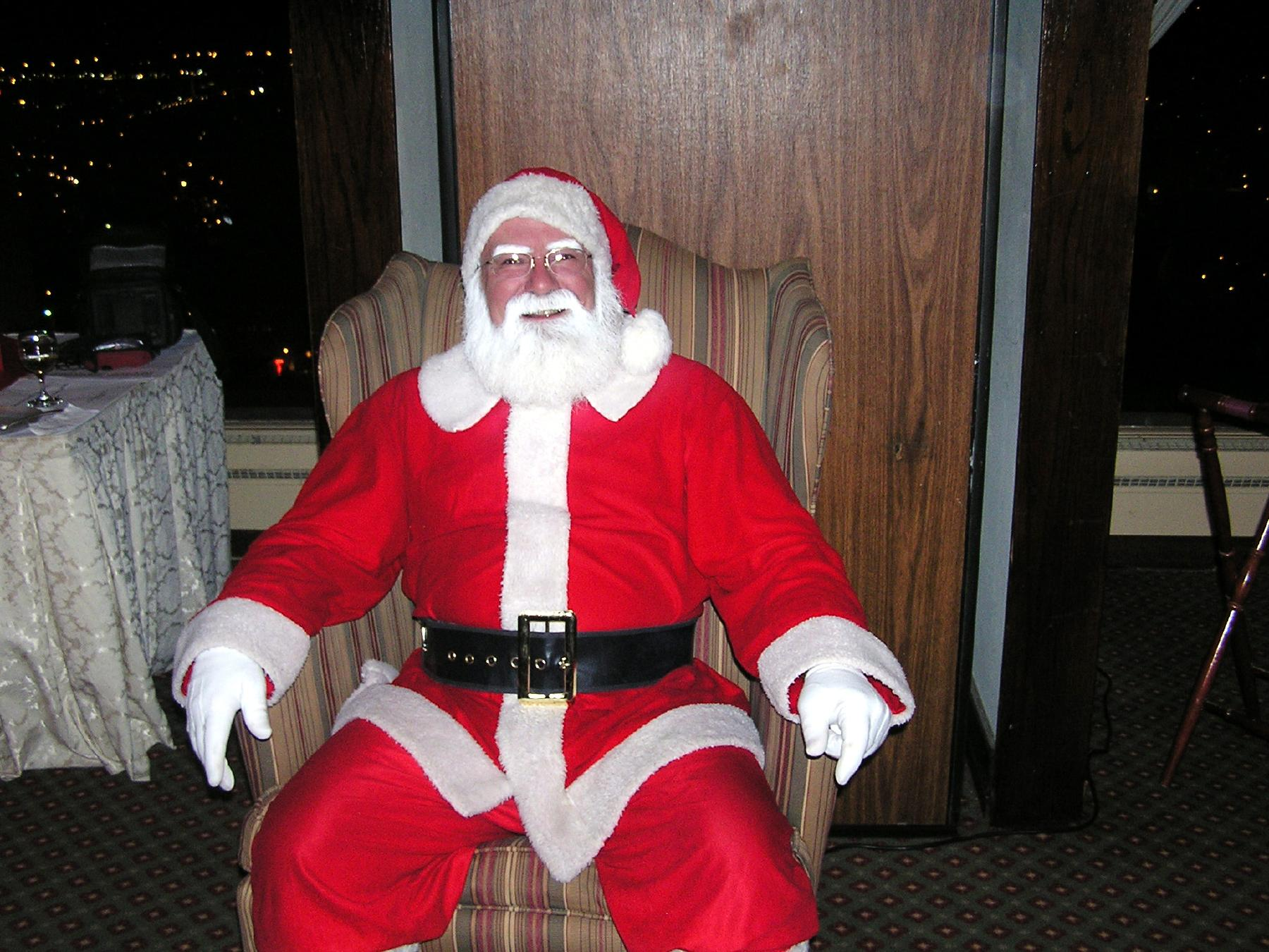 Santa Claus